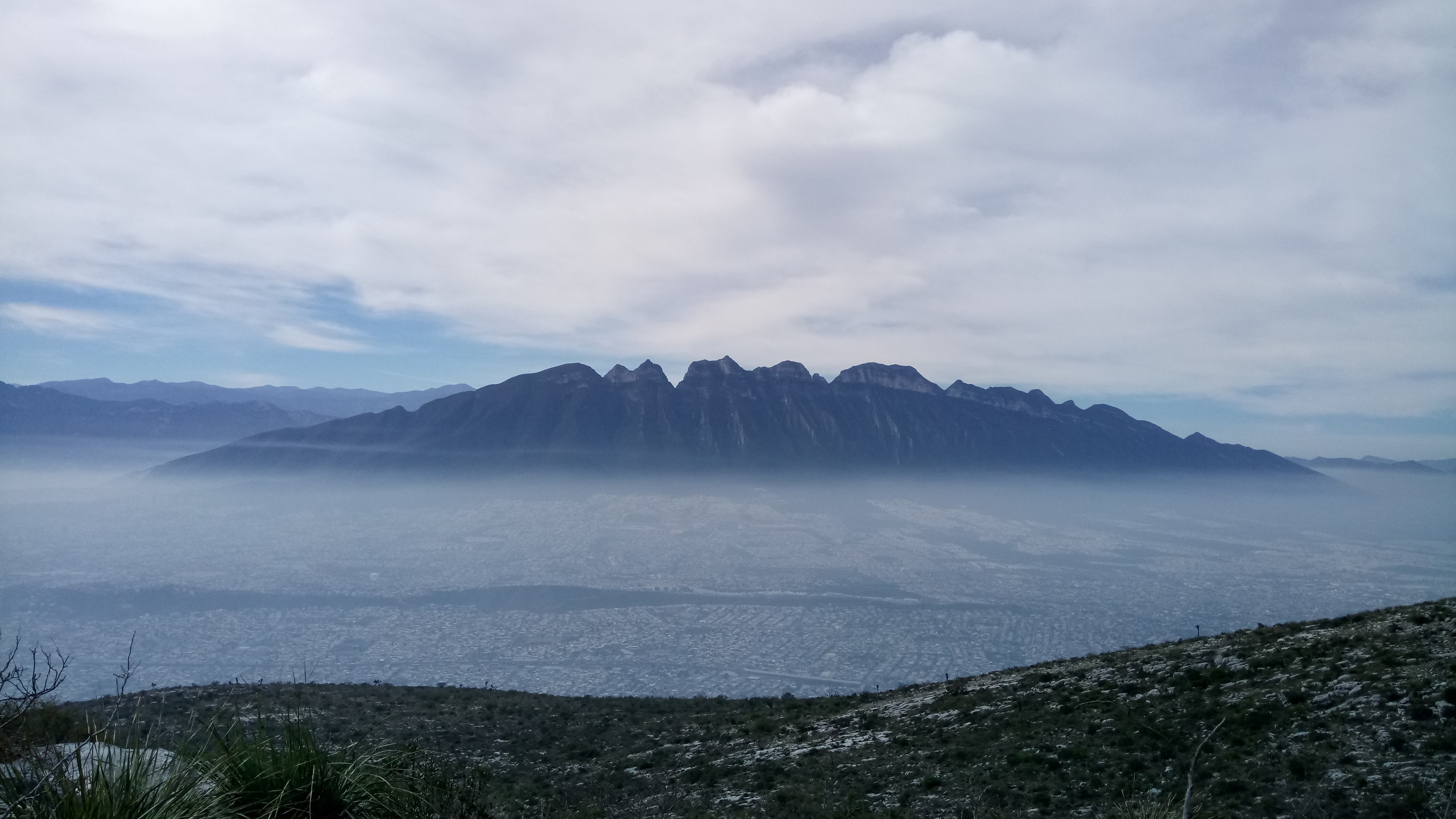 Montañas y más montañas